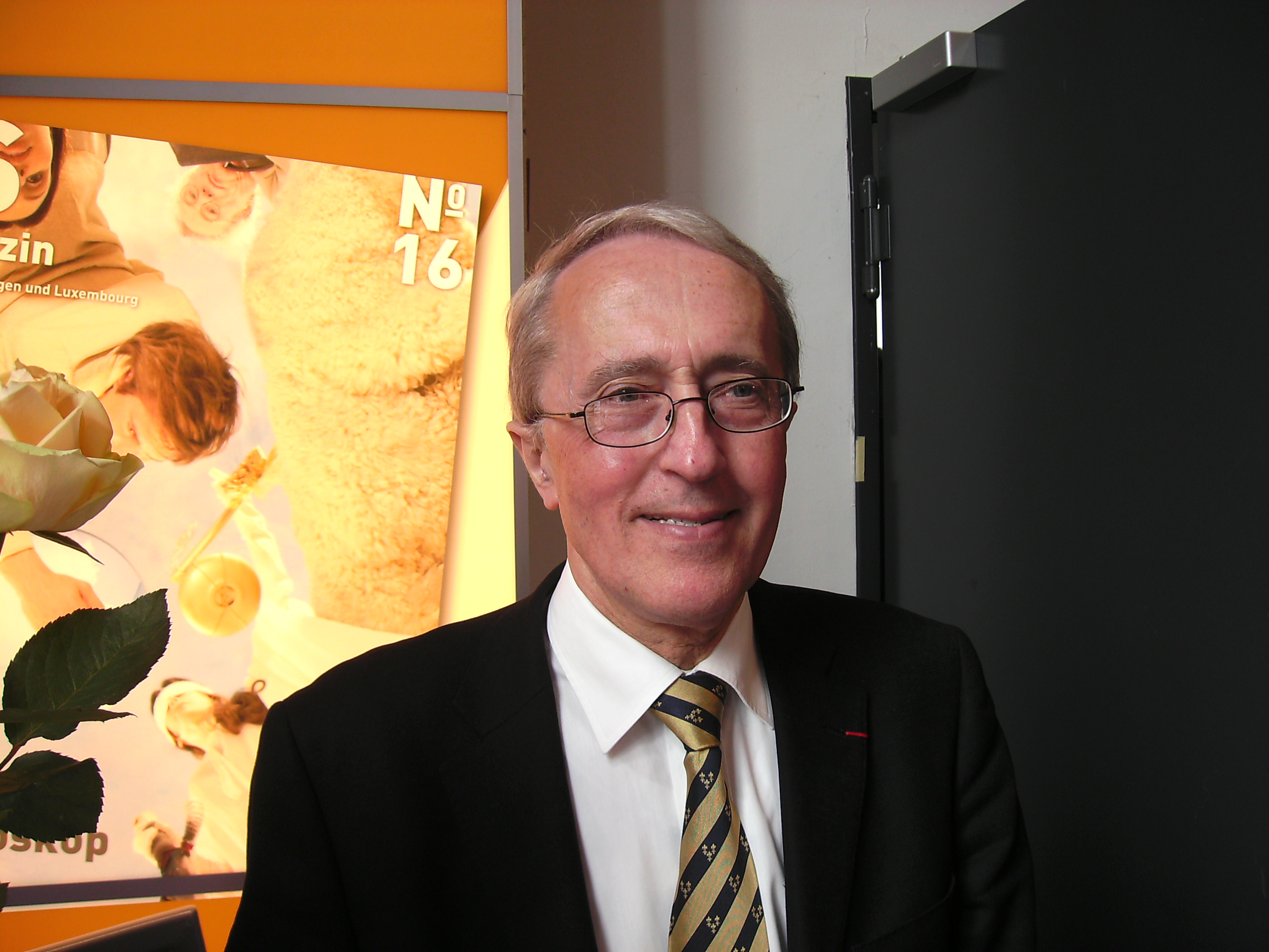 Portrait Kurt Bohr